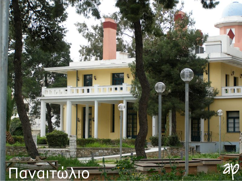 Το παλαιο ξενοδοχείο "Παναιτώλειον" και νυν πνευματικό κέντρο στην Αλσούπολη του δήμου Νέας Ιωνίας Αττικής